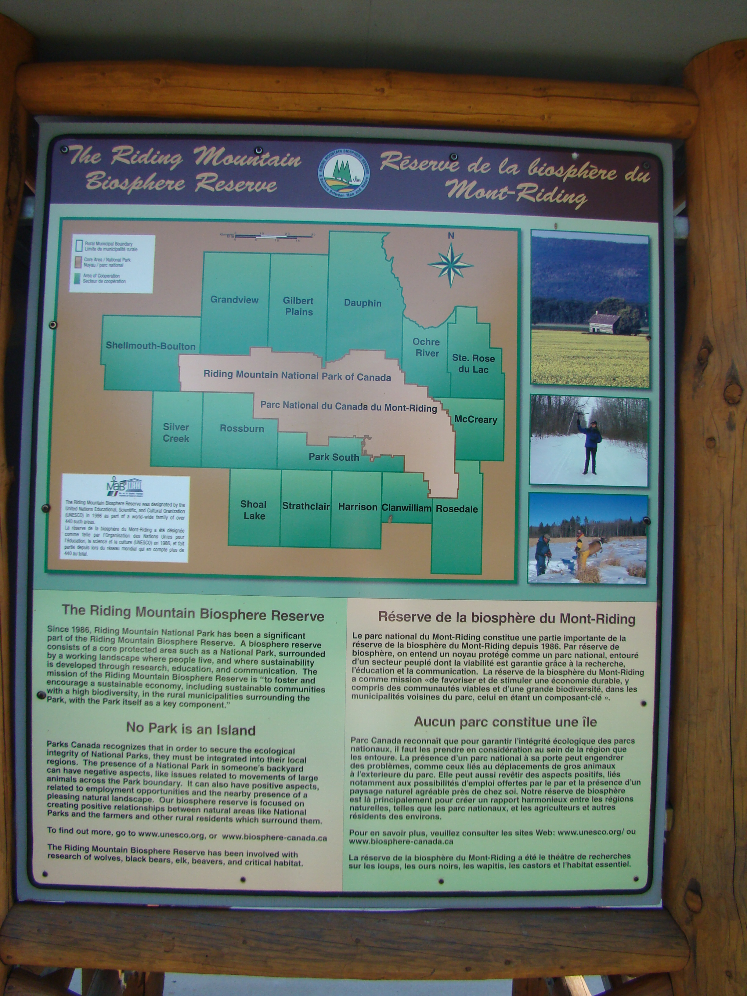 Riding Mountain National Park Manitoba Canada